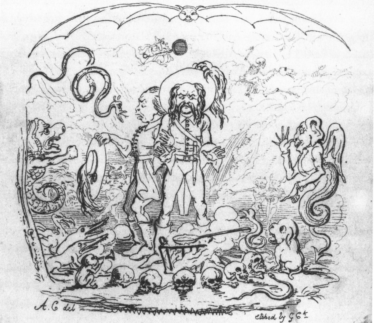 Illustration zu einer Londoner "Freischütz"-Parodie.